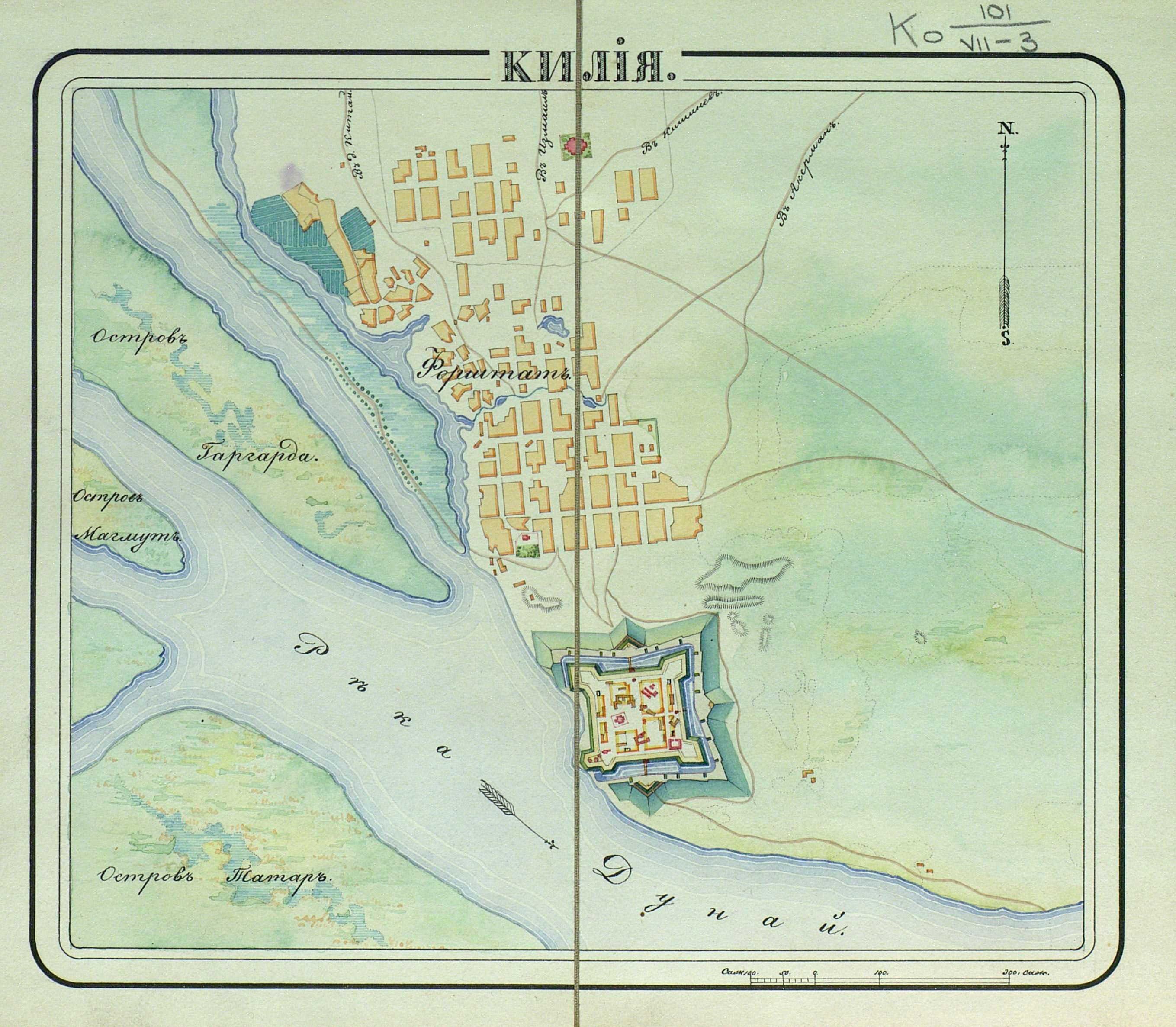 Kiliya